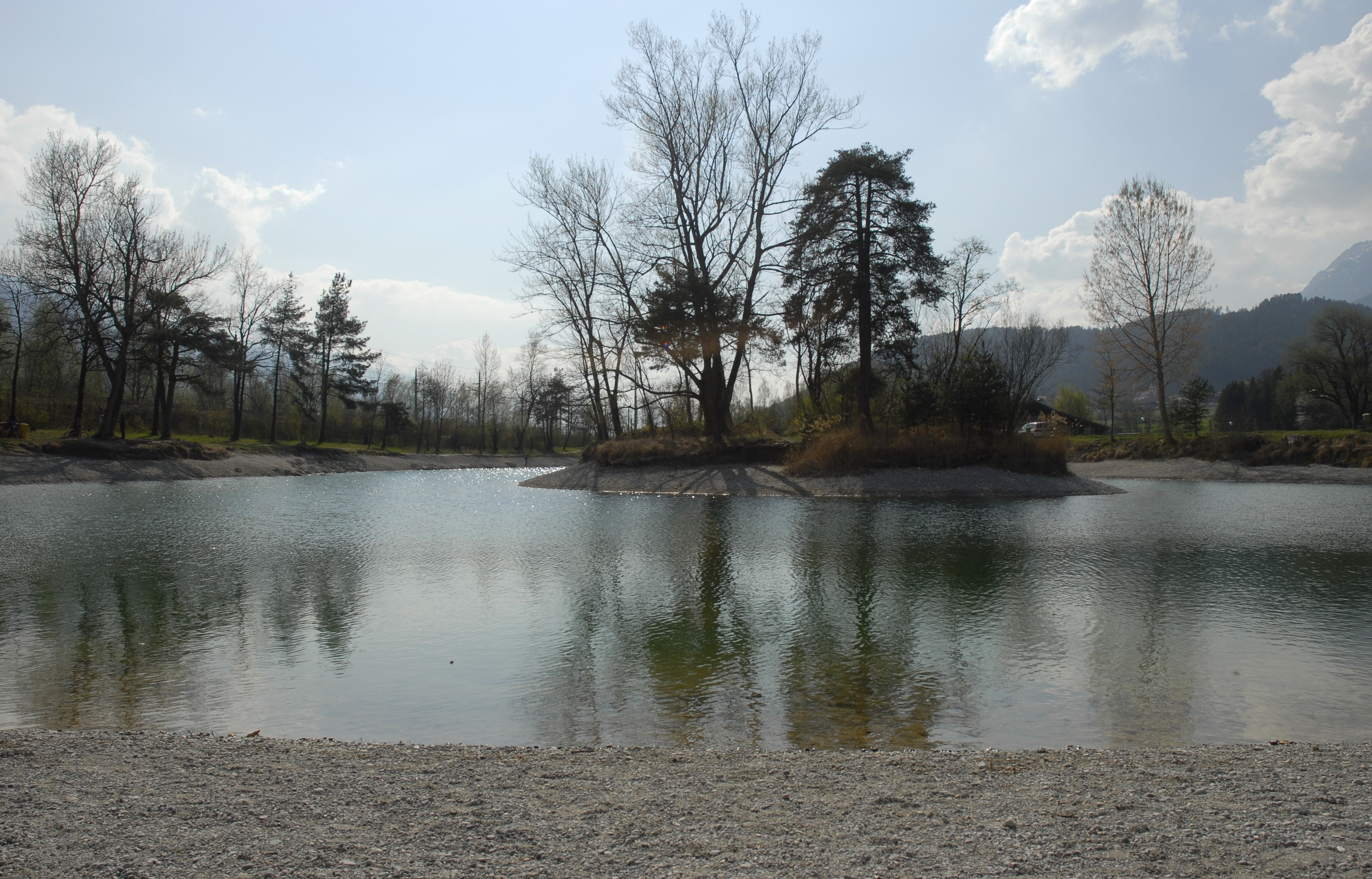 Lake Weißlahn near Terfens, Tyrol